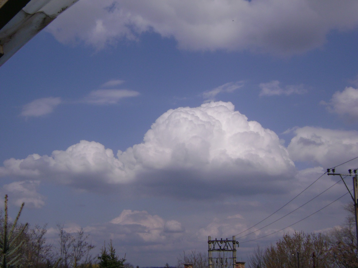 Konvektív felhő (Cumulus mediocris) Balassagyarmat felett